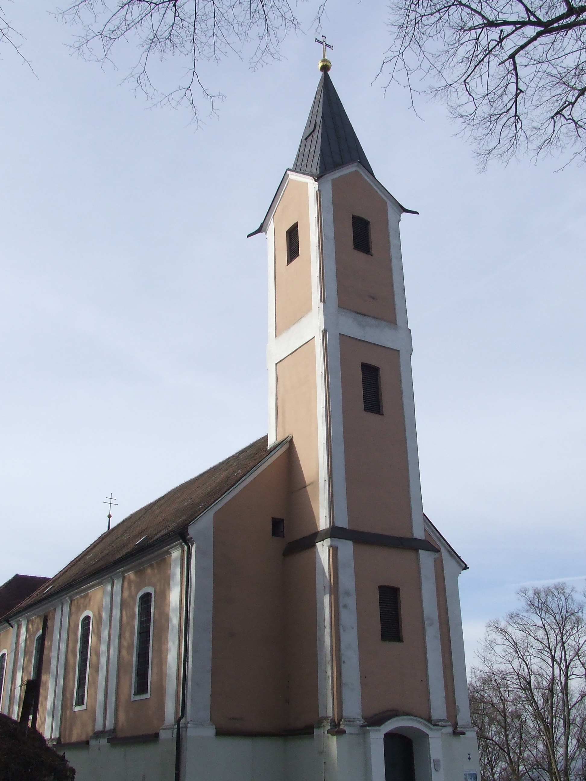 Stadt Neumarkt in der Oberpfalz, Kirche/Wallfahrtskirche MariaHilf von außen / Norden